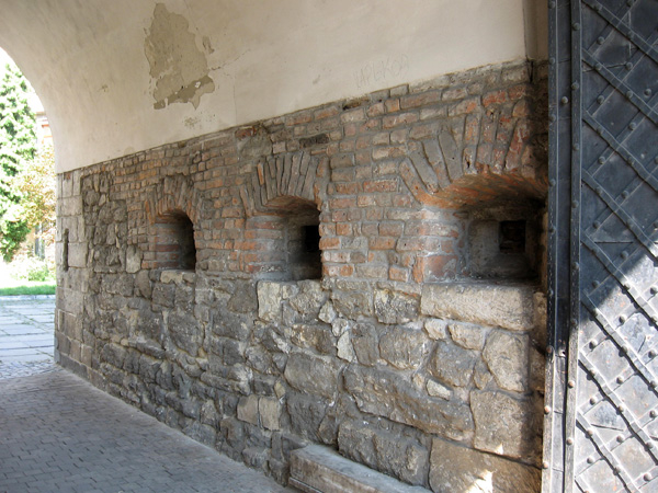 Бійниці Глинянської брами